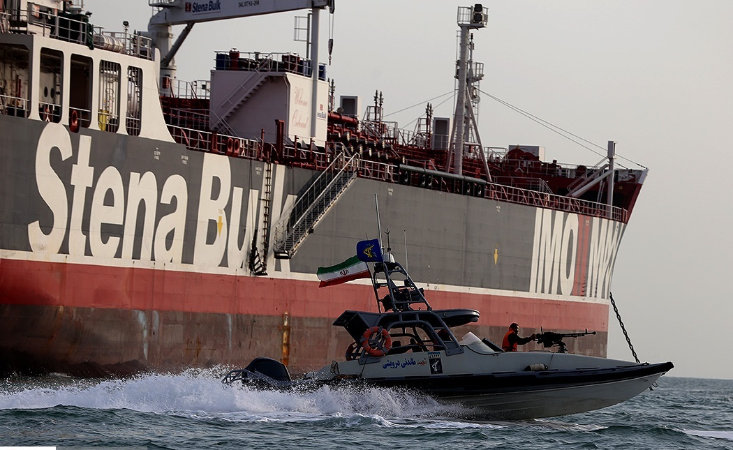 نفتکش انگلیسی استینا ایمپرو، توقیف‌شده توسط ایران